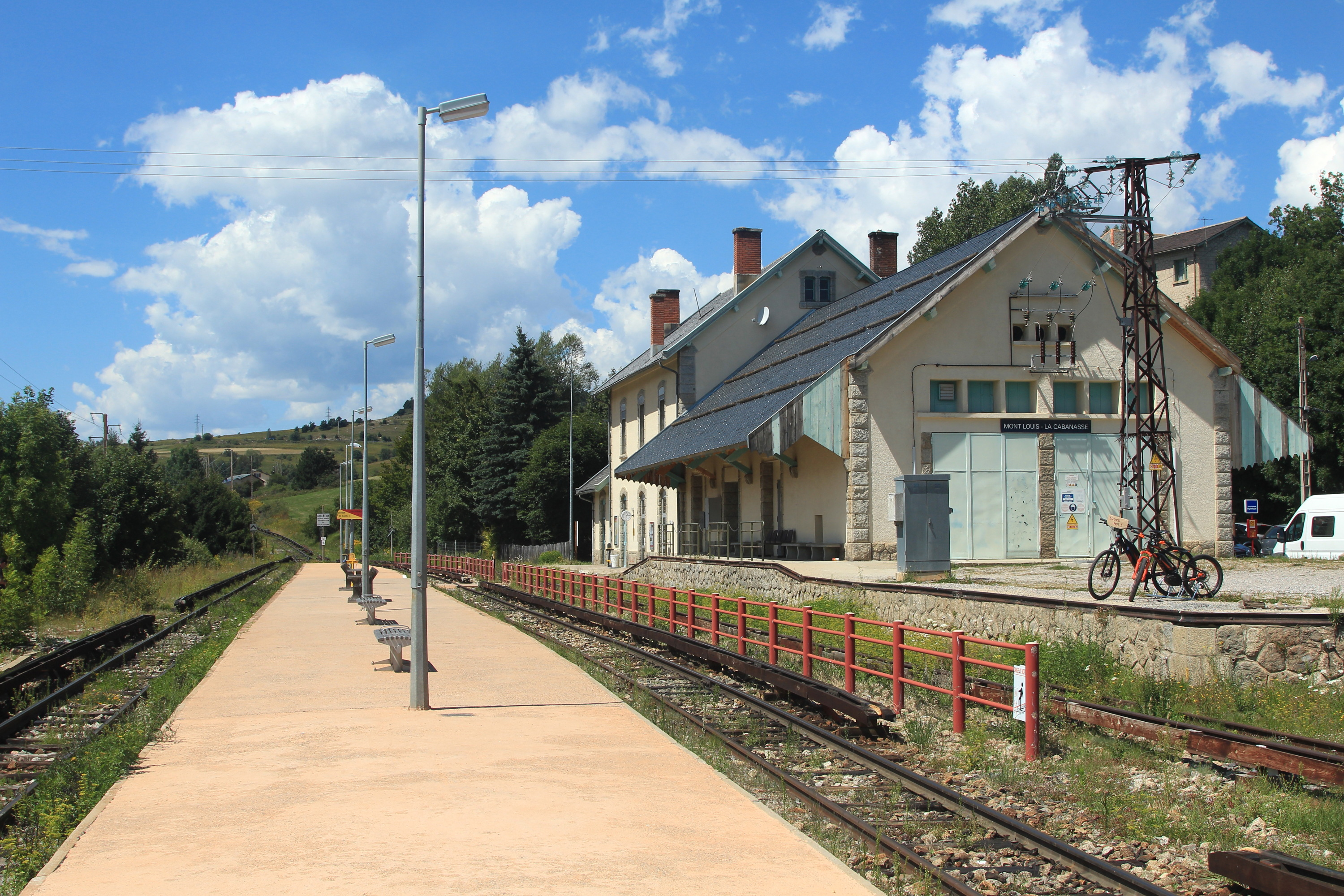 Vue générale de la gare de Mont-Louis - La Cabanasse, en direction de Latour-de-Carol.